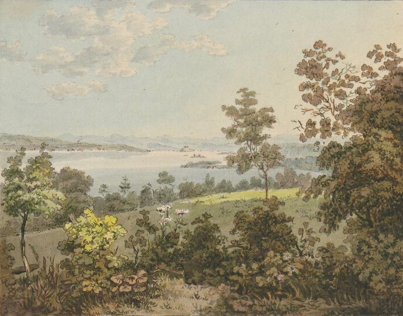 Heinrich Keller (1778–1862): Gegend Beÿ Richtenschweil wo das Gefecht vorfiel, A. 1798. (Gemeint ist das Gefecht bei Wollerau am 30. April 1798 zwischen Franzosen und Glarnern.) Kolorierte Umrissradierung, 9 x 11,5 cm. Zentralbibliothek Zürich, ZH, Richterswil I, 60.